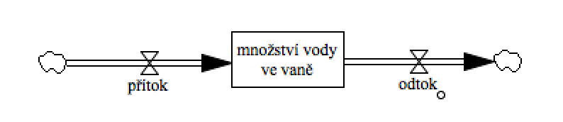 SFD, pritok a odtok diagram Vensim